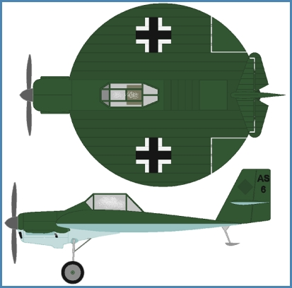 Sack_AS6